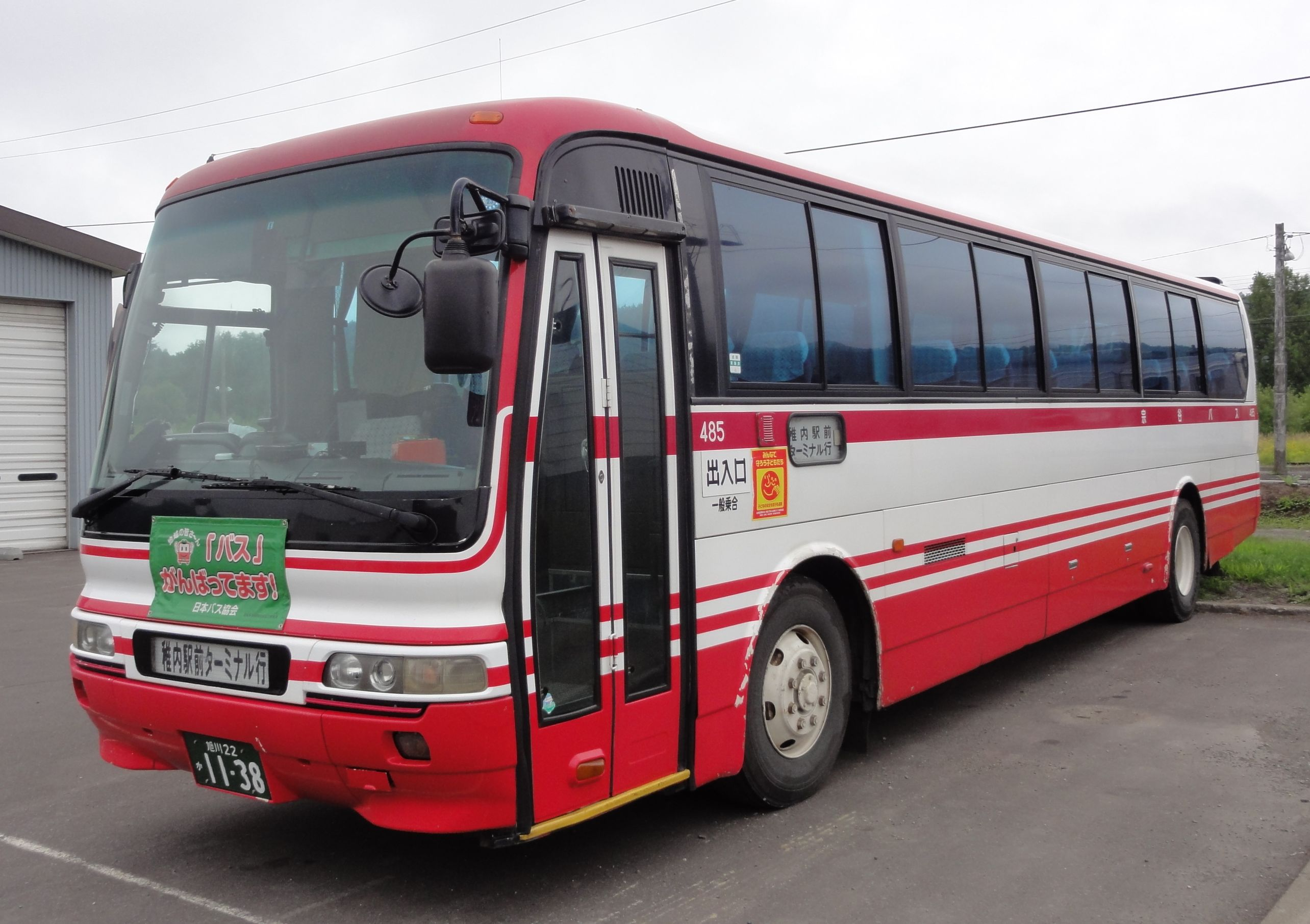 Sōya Bus, Omnibus car 宗谷バス 路線用車両